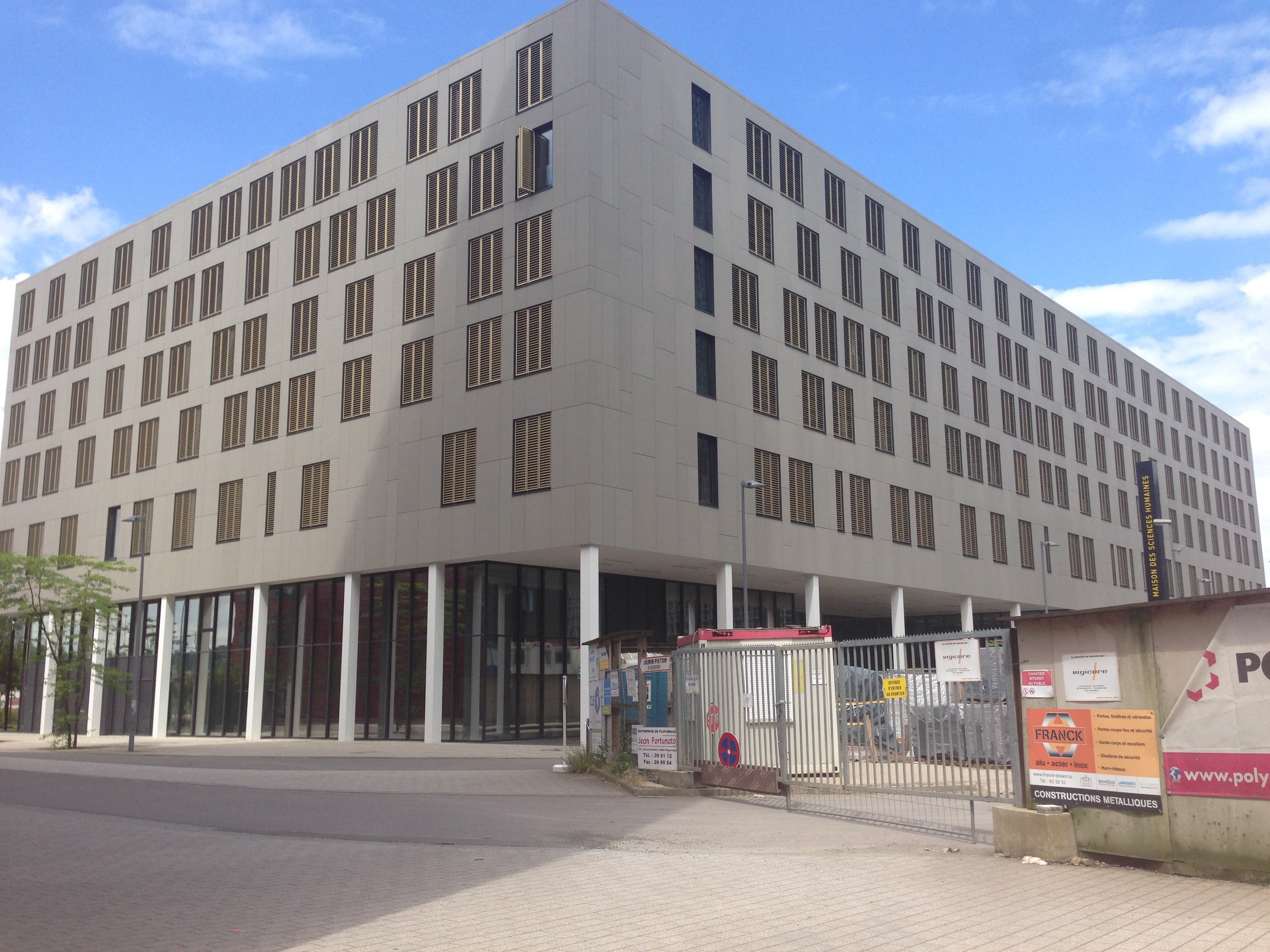 Maison des Sciences humanines; Universität Luxemburg in Esch an der Alzette